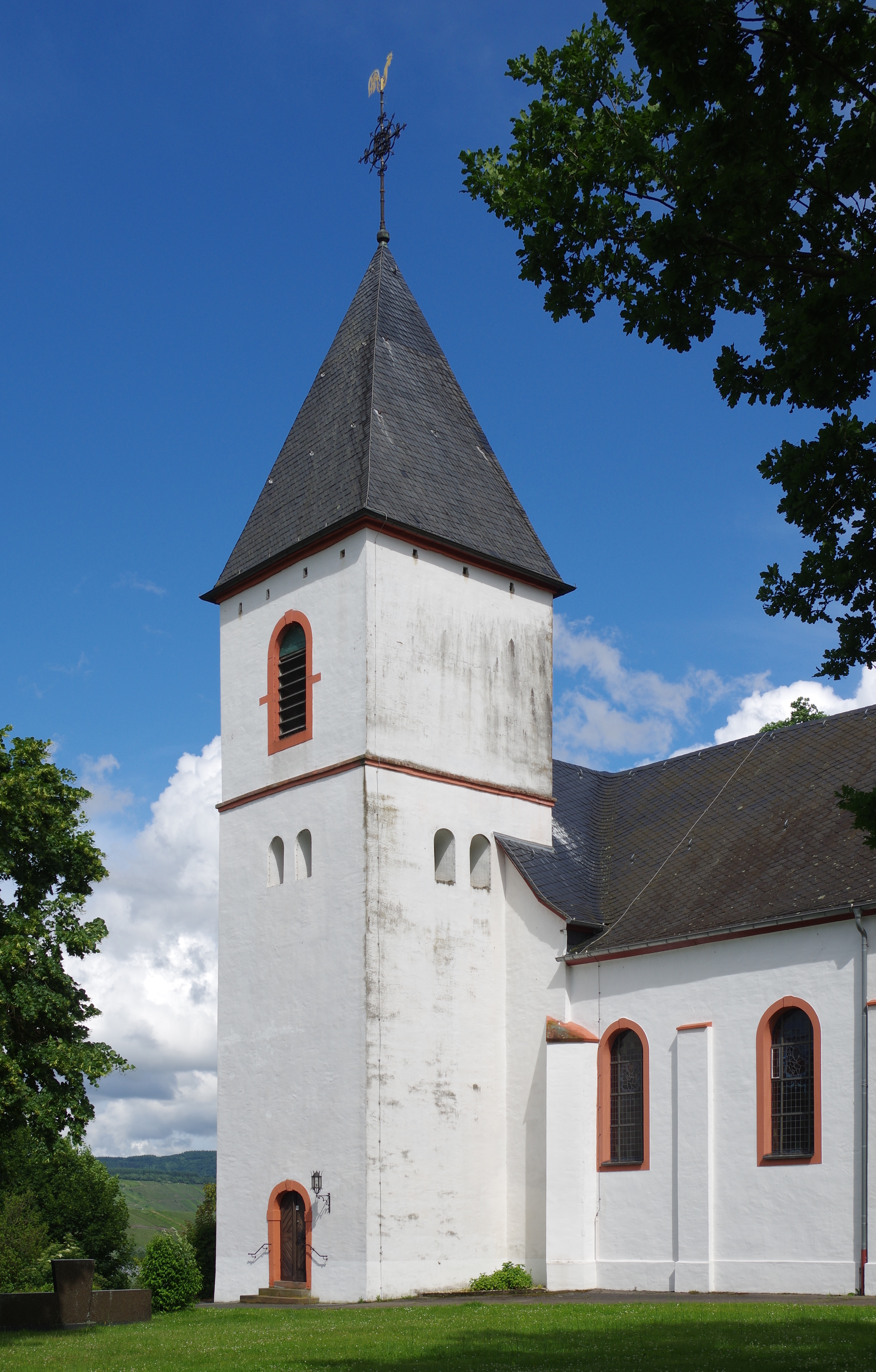 Riol, Katholische Pfarrkirche St. Martin, von Nord